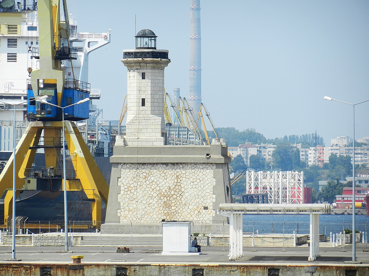 Farul vechi Carol I